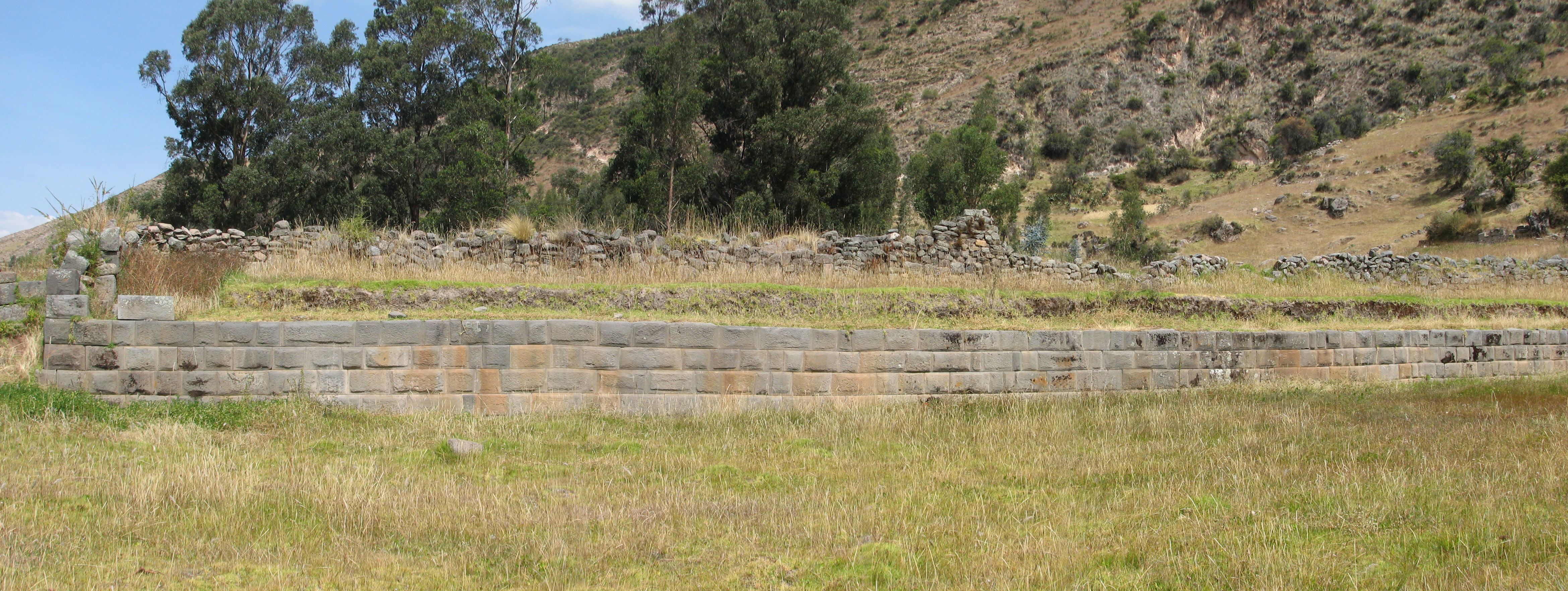 Pumacocha Archaeological site (terrace)